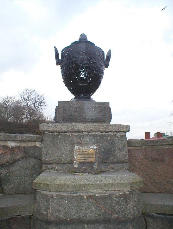 Bergslagsurna, av Eric Grate 1922, vid västra änden av Allmänna Vägen, Majorna, Göteborg. Fotot taget av Per Johansson 2005.